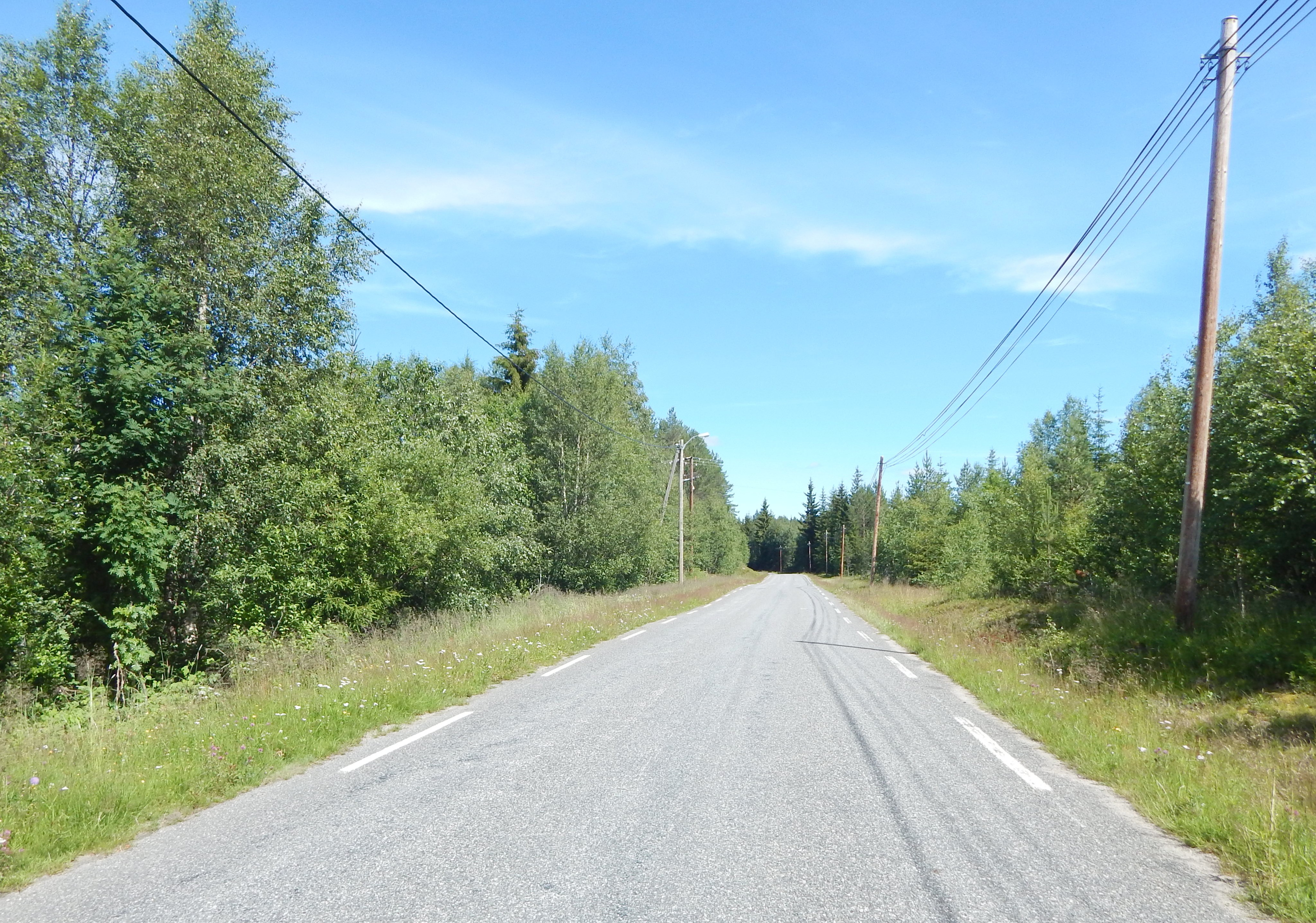 Hernesvegen (FV545) sør for Linnavegen